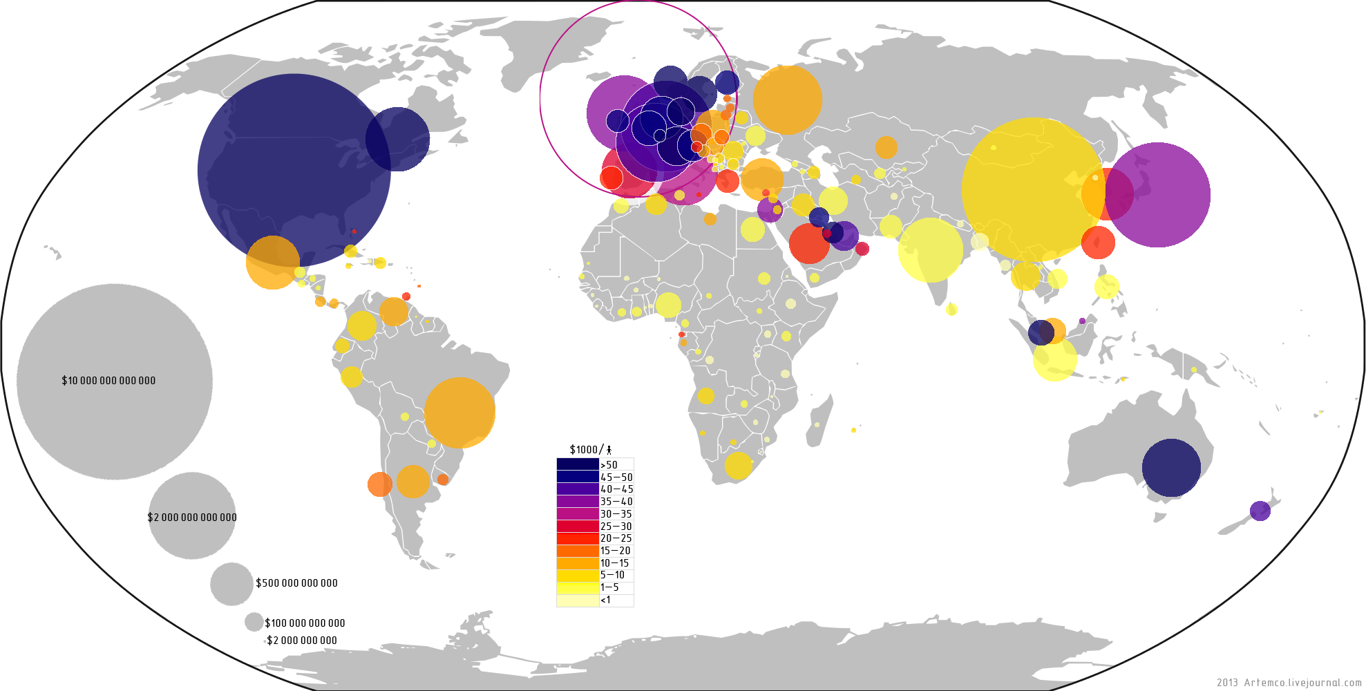 ВВП по МВФ 2013 в кружочках, цвета - ВВП на душу населения